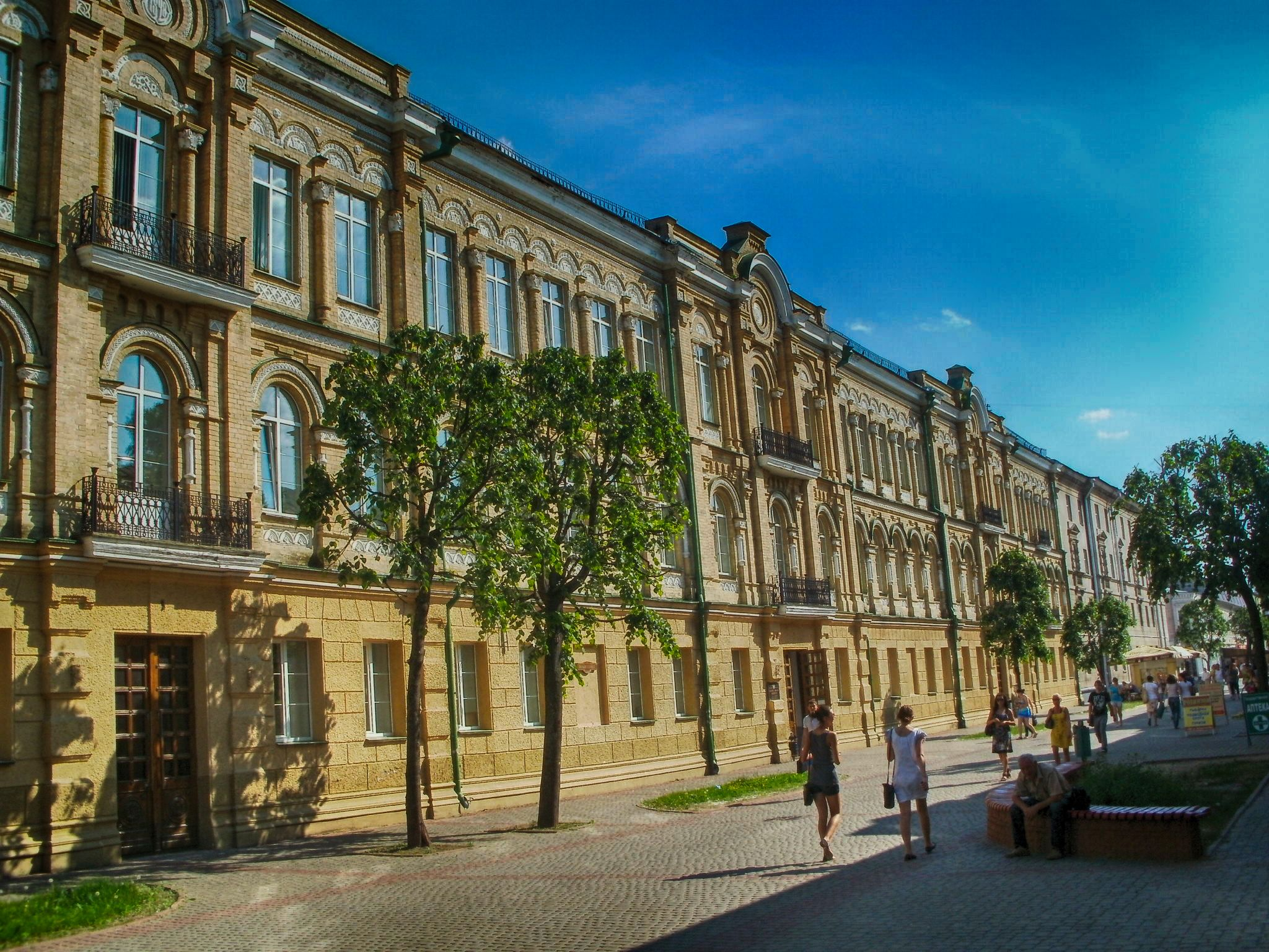 Беларуская (тарашкевіца): Магілеў, вуліца Ленінская (былая Ветраная) і яе забудова